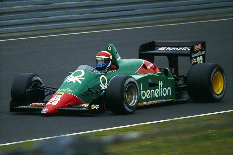 Eddie Cheever im Alfa Romeo 184 T 1985 beim Training zum Großen Preis von Deutschland auf dem Nürburgring. Im Programmheft ist der Wagen fälschlicherweise als 185 T bezeichnet, der aber bei diesem Rennen nicht eingesetzt wurde.